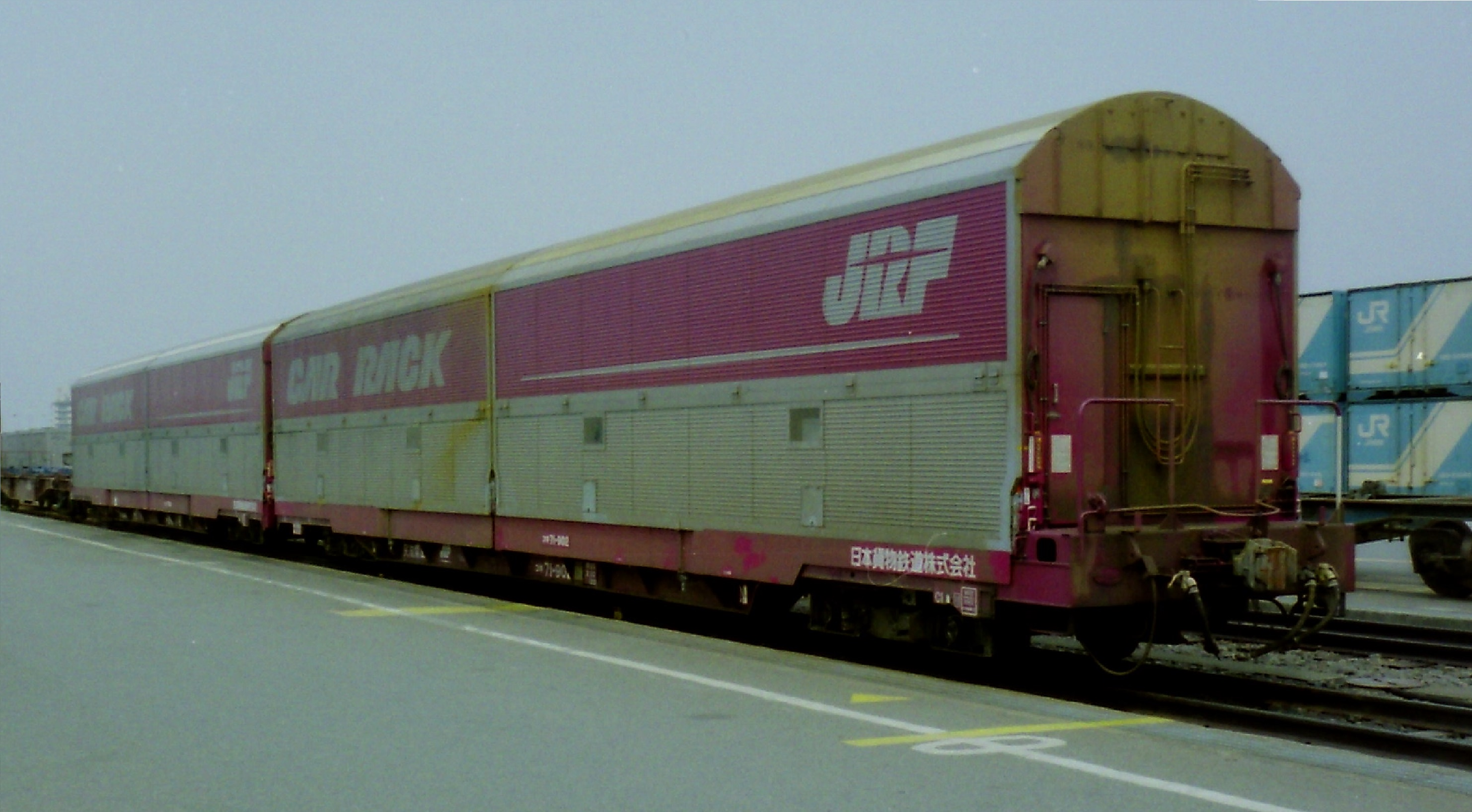 名古屋貨物ターミナル駅構内で今は無きカートレインへ、カーラックコンテナを積載している作業風景。